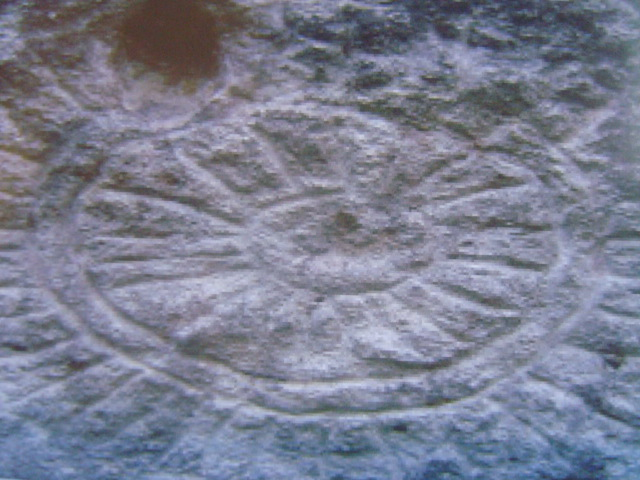 Petroglifo de la cultura amerindia de los corobicíes, ubicado en el Monumento Nacional El Farallón, cantón de Cañas, Guanacaste, Costa Rica.